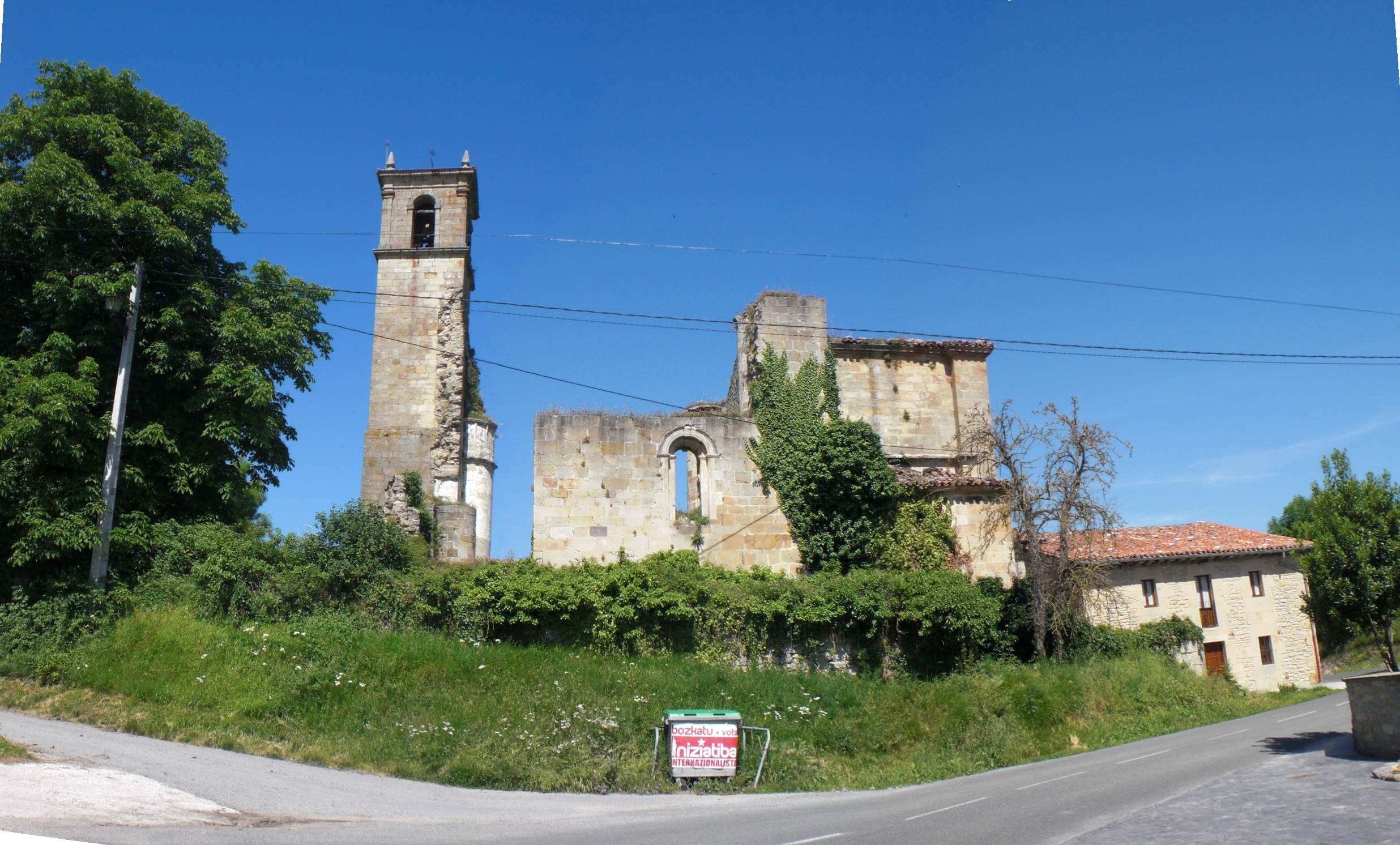 Galarretako elizaren hondakinak.